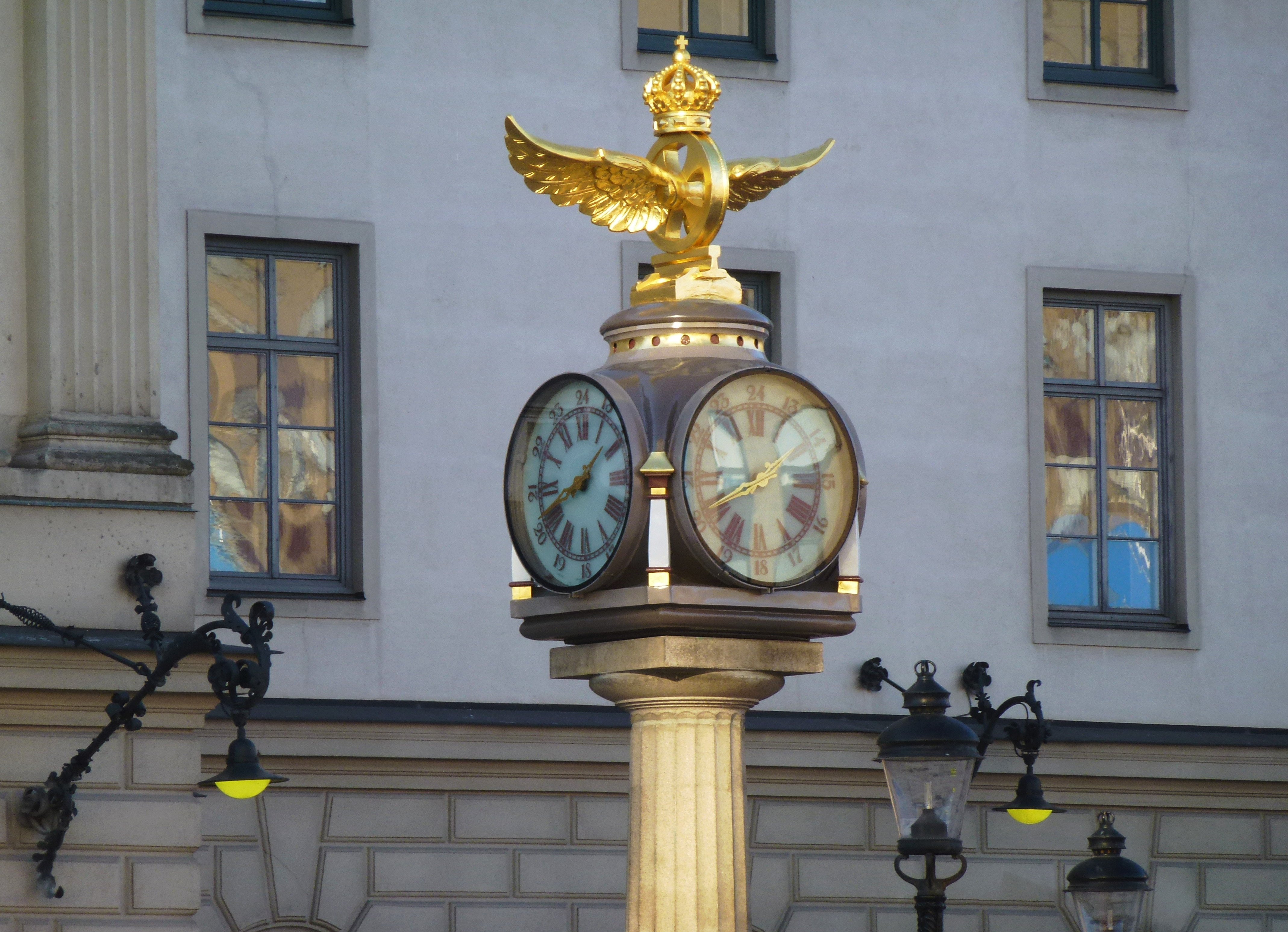 Tornbergs ur efter renoveringen på Centralplan i Stockholm